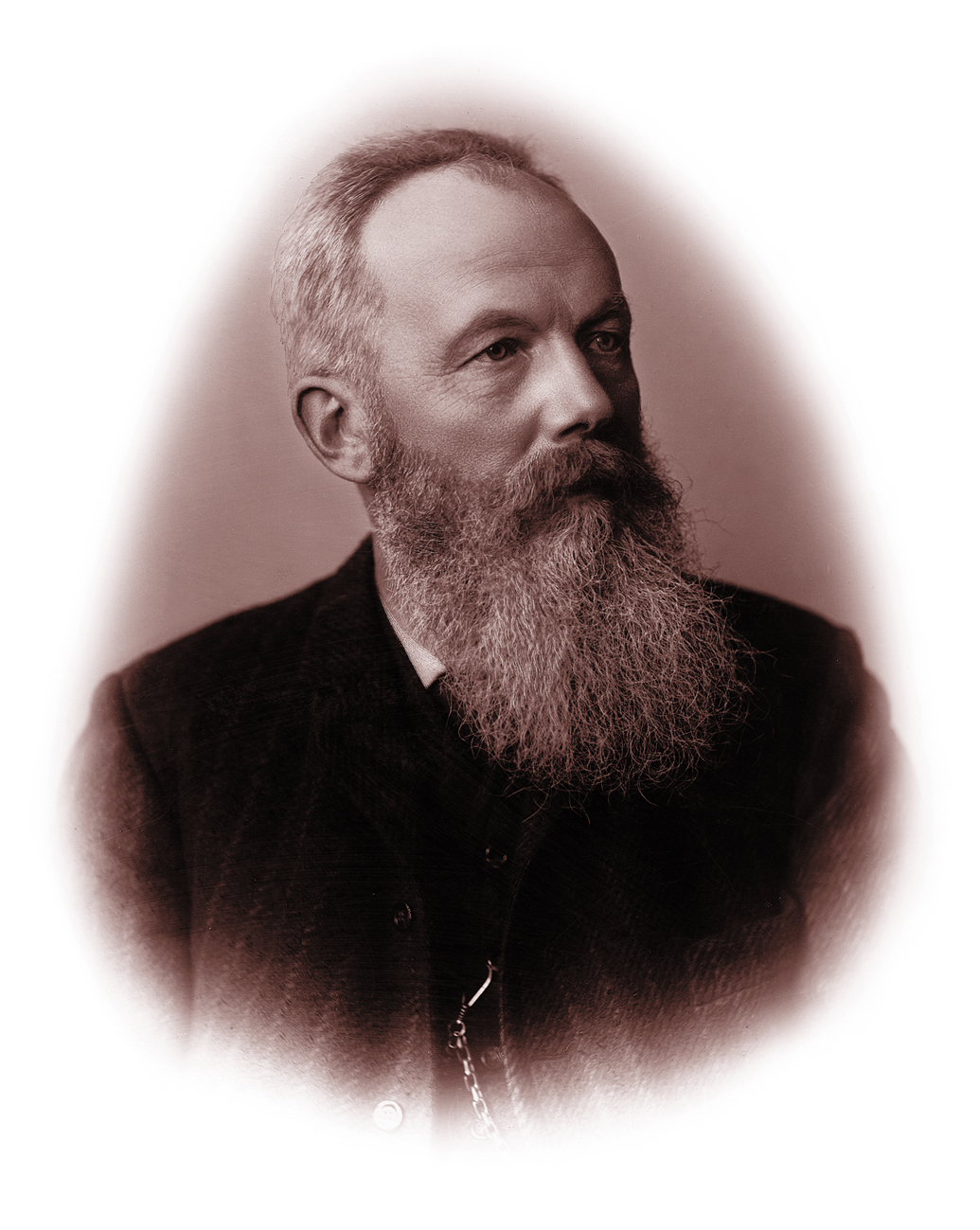 Hugo Erfurt (1834–1922), Erfinder der Raufaser